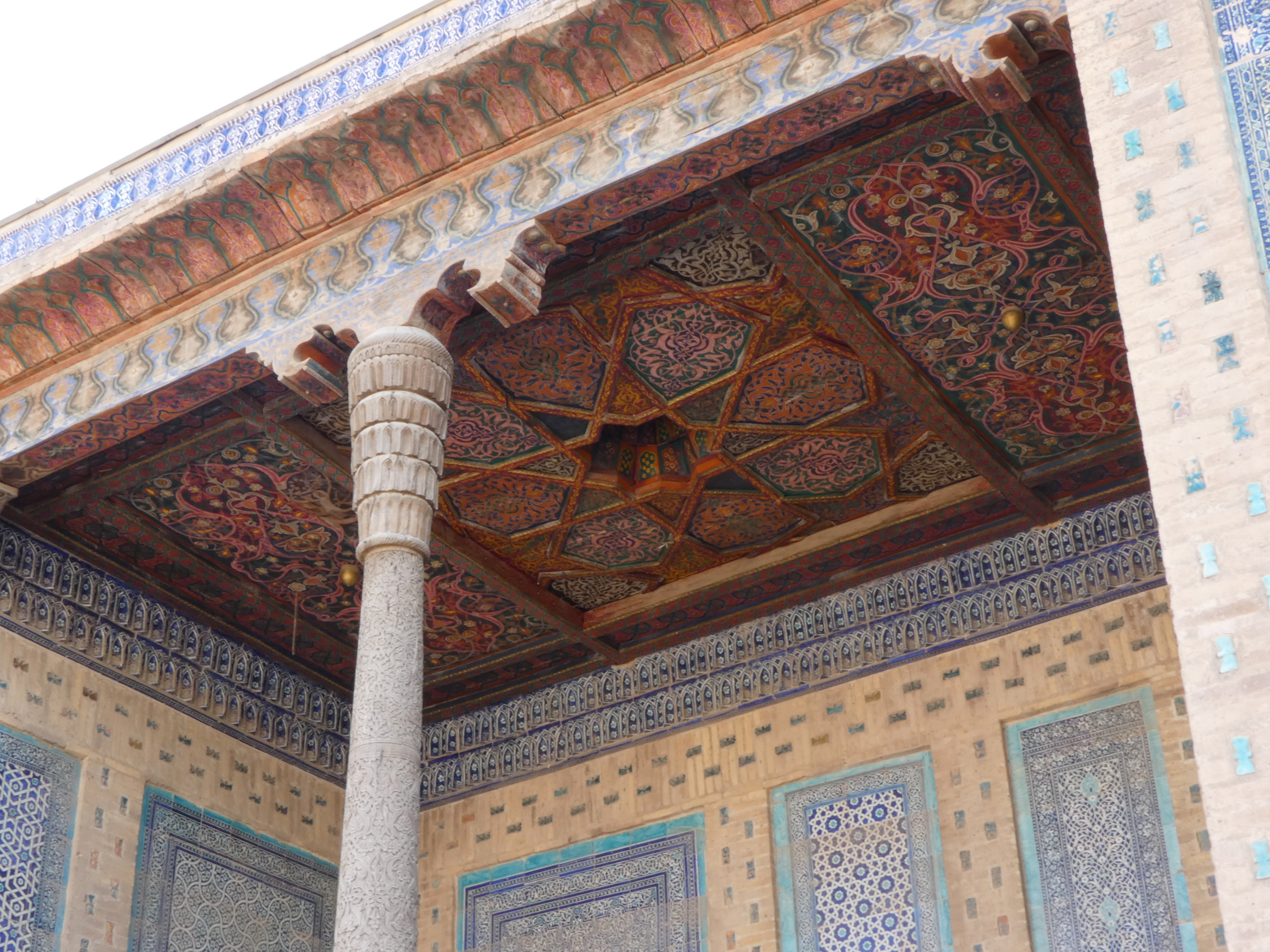 Deckendekor im Iwan im Harem Tasch Haulis, Chiwa